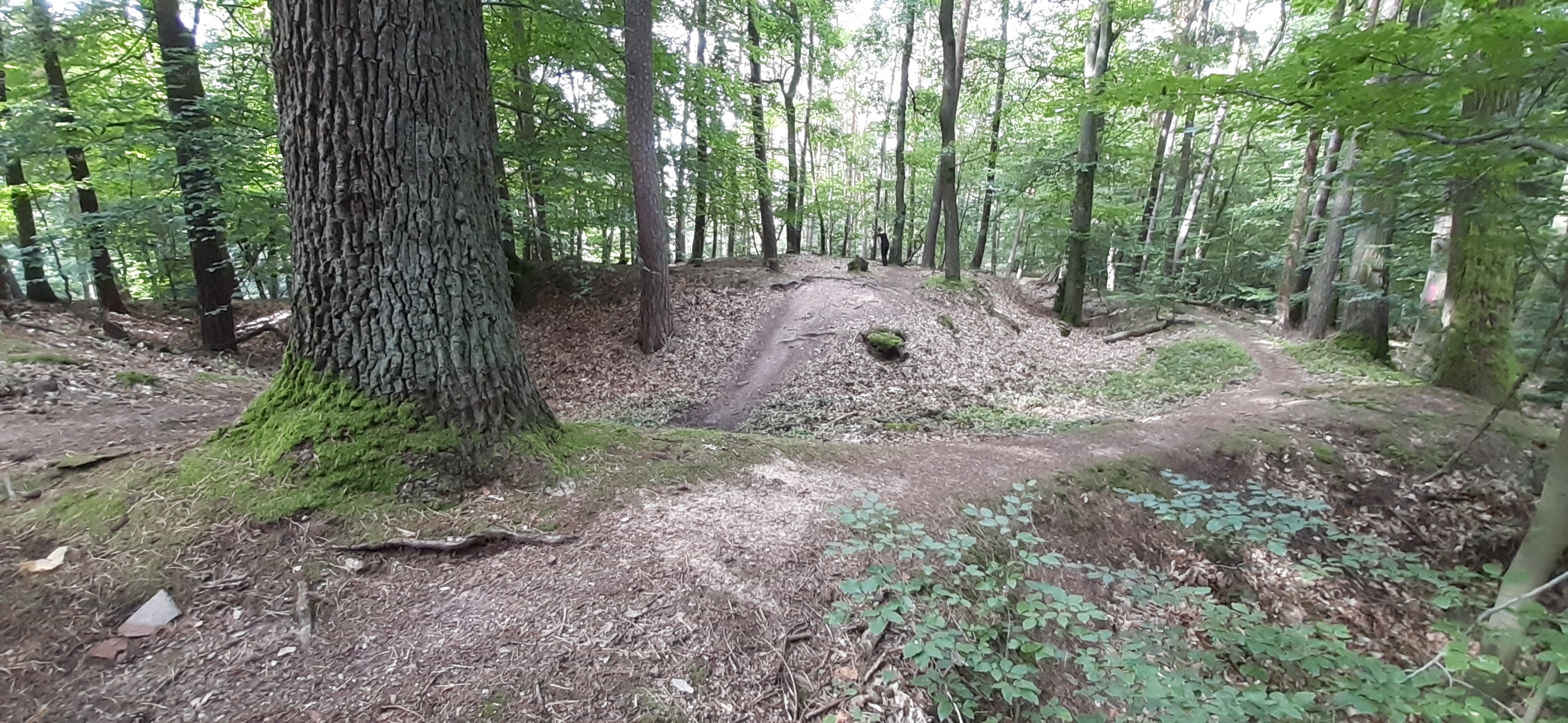 Die Mainzische Gegenburg zur Randenburg, kastellartig mit Wall-Grabensystem und Binge (Wassersammler)